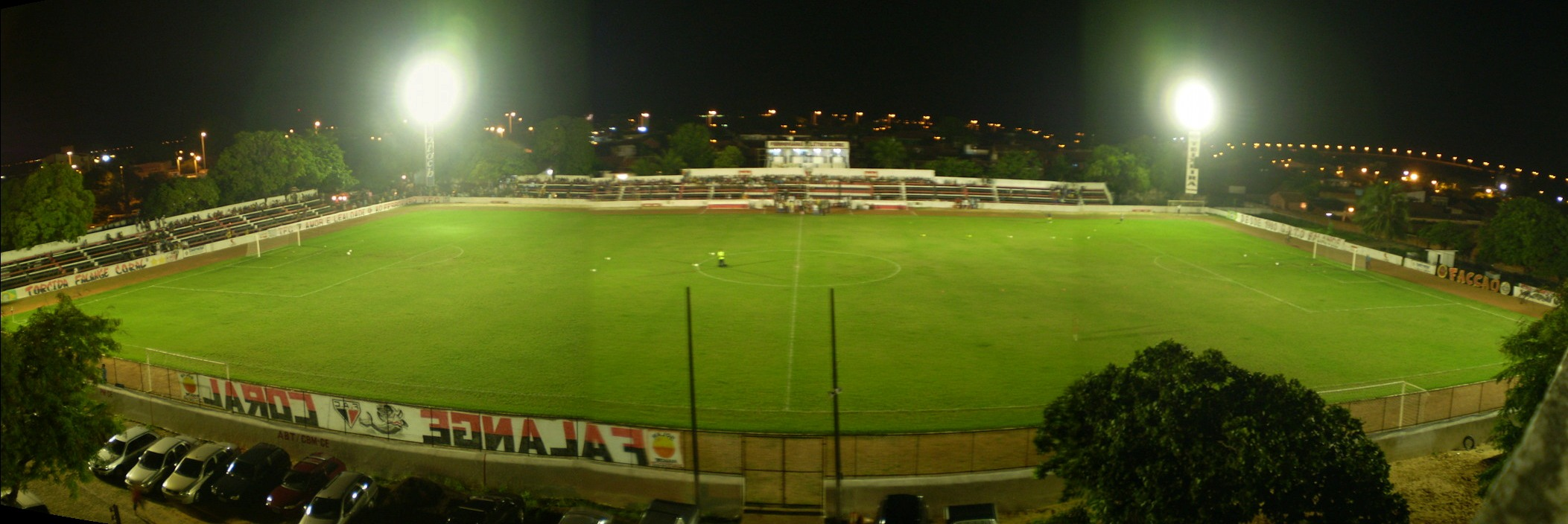 Estádio Elzir Cabral. Fortaleza, Ceará, Brasil.